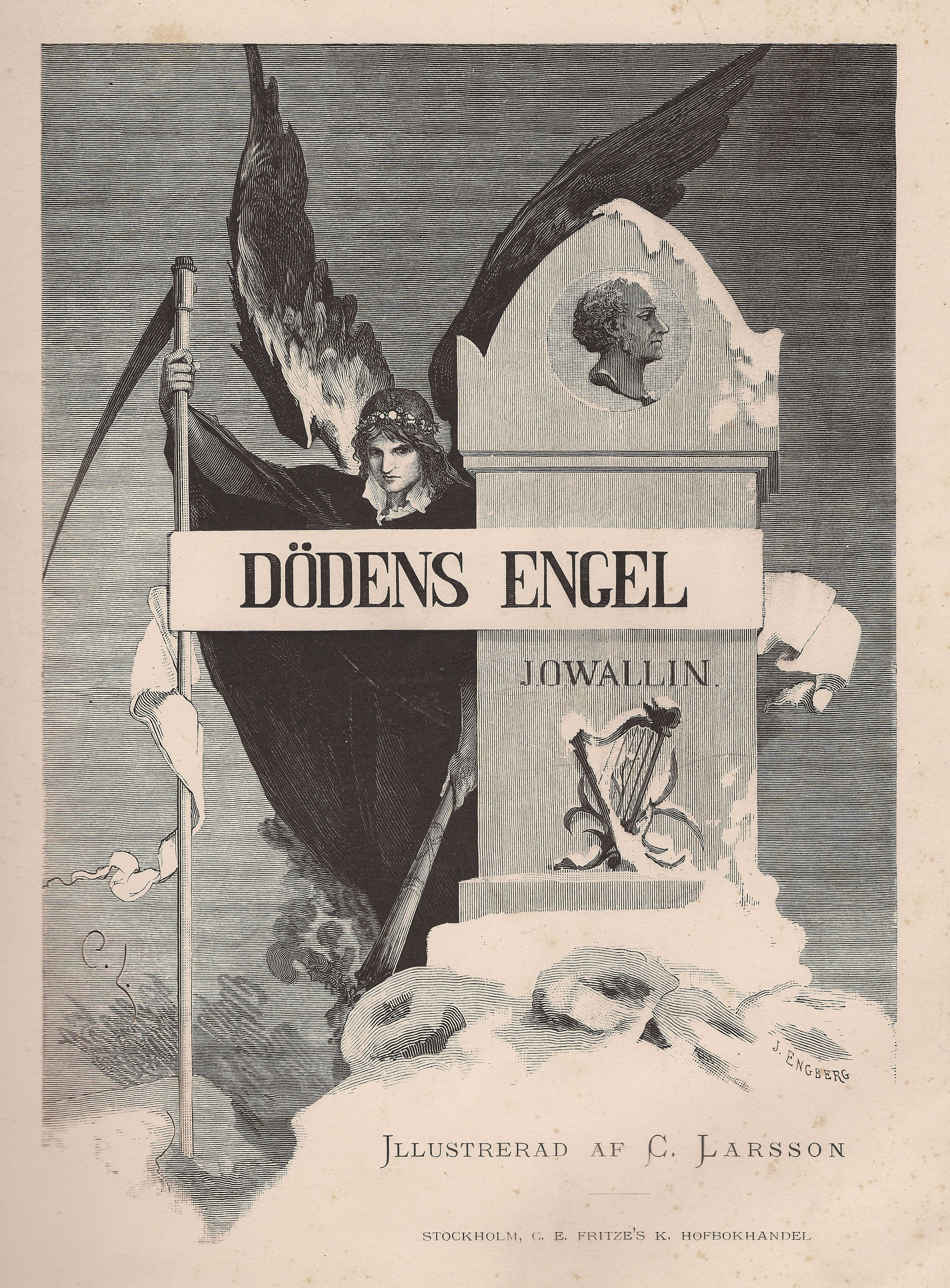 Titelblad till Dödens Engel af Johan Olof Wallin, illustrerad 1880 av Carl Larsson